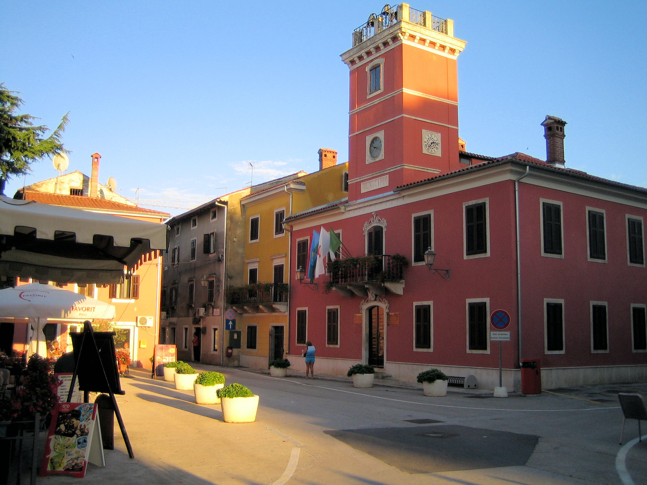 Novigrad